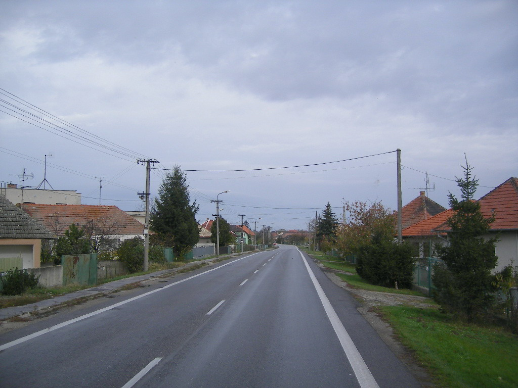 Nagykér - 64-es út